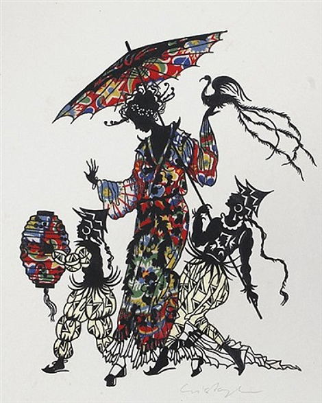 Exotische Prinzessin von zwei kleinen Dienern mit Sonnenschirm und Lampe begleitet